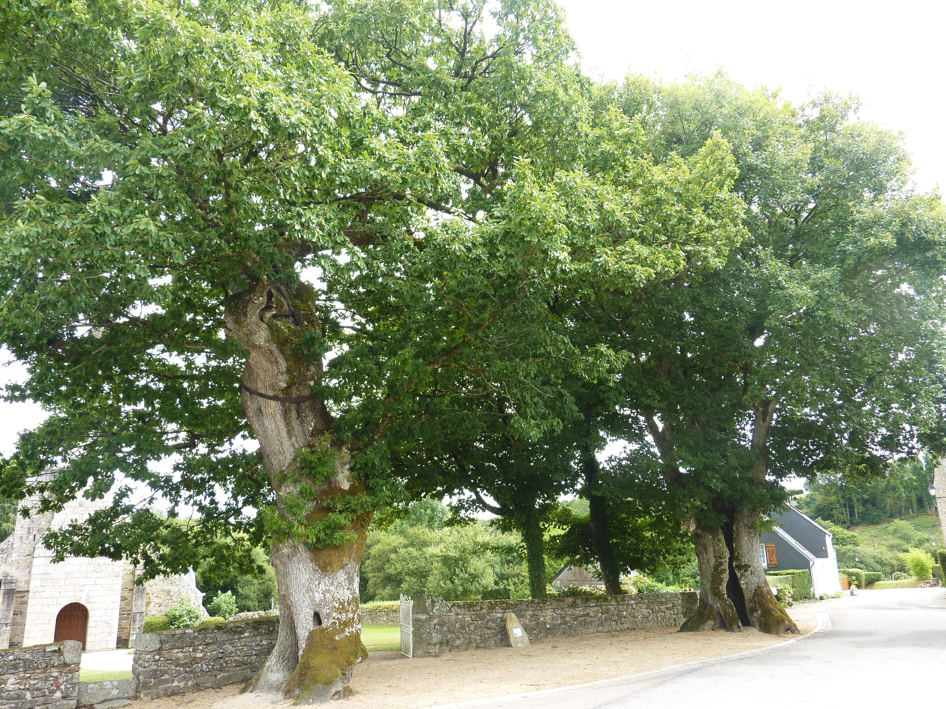 Locmaria-Berrien : les deux chênes pédonculés ont reçu le label « Arbre remarquable de France » en mai 2003.